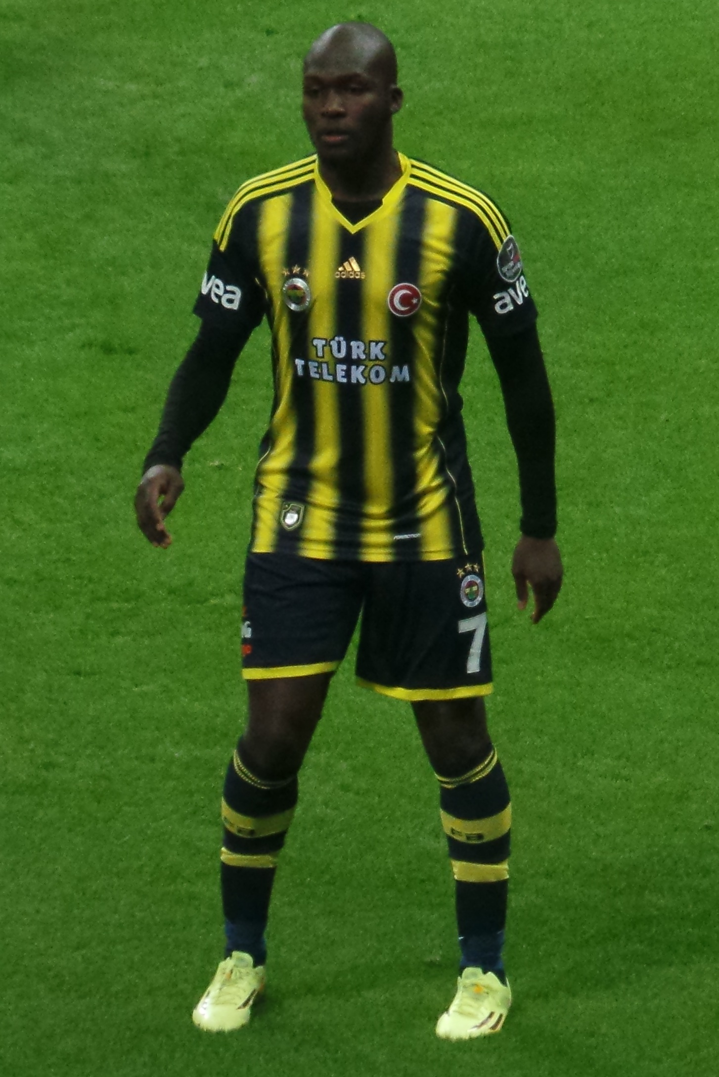 Moussa Sow